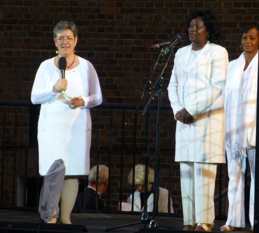 Sylvia Wähling Geschäftsführerin Menschenrechtszentrum Cottbus, begrüßt Yaquelin Boni und Berta Soler bei der Premiere des Fidelio am 28.06.2014